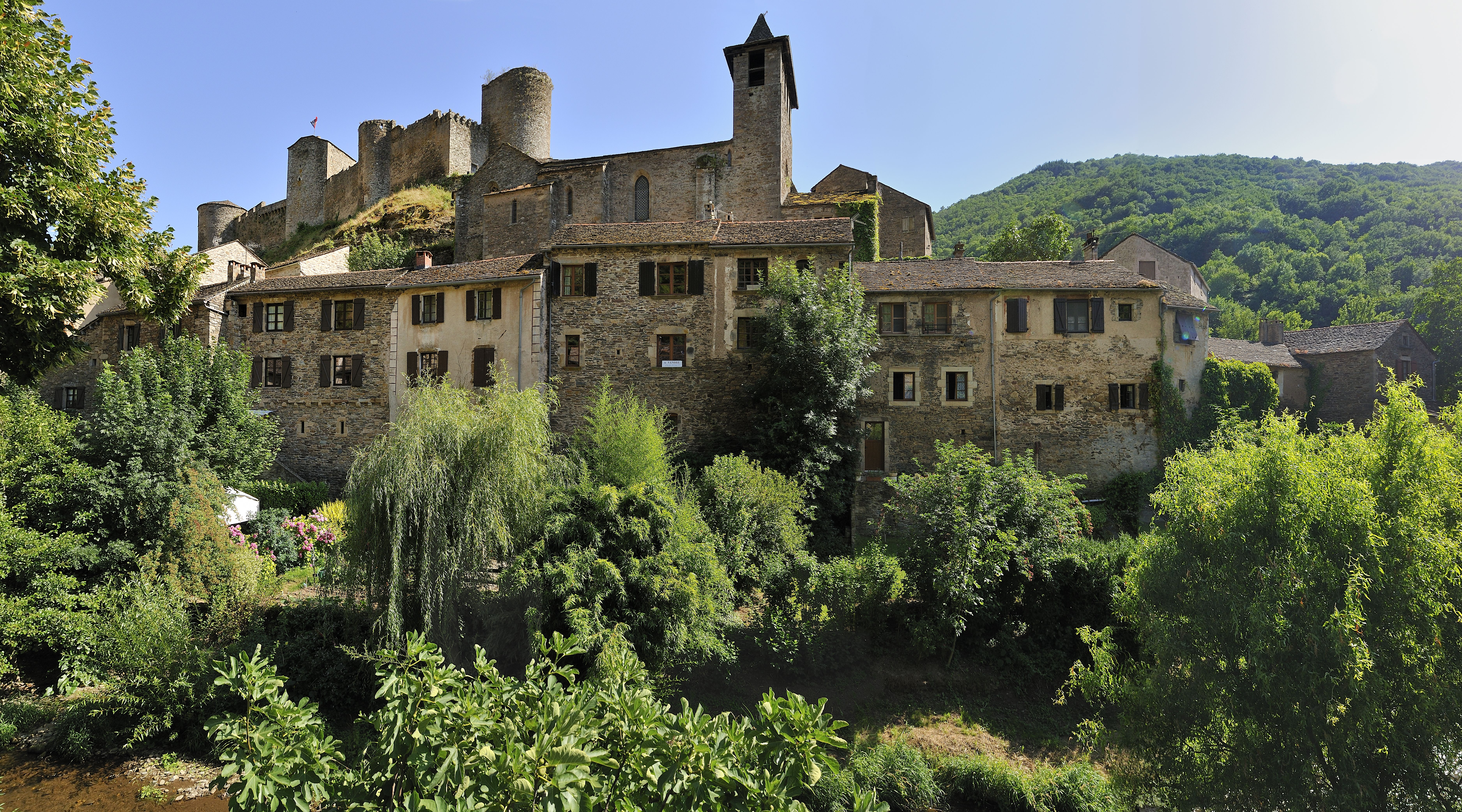 Vue générale du vieux bourg, avec le château et l'église .